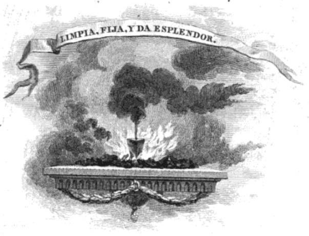 Lema de la RAE